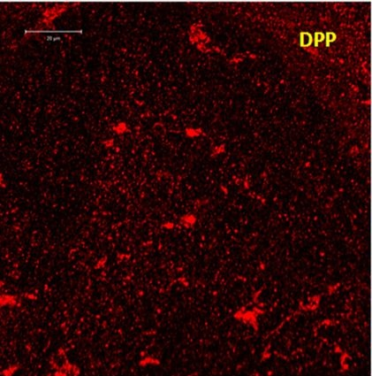 phosphophoryn